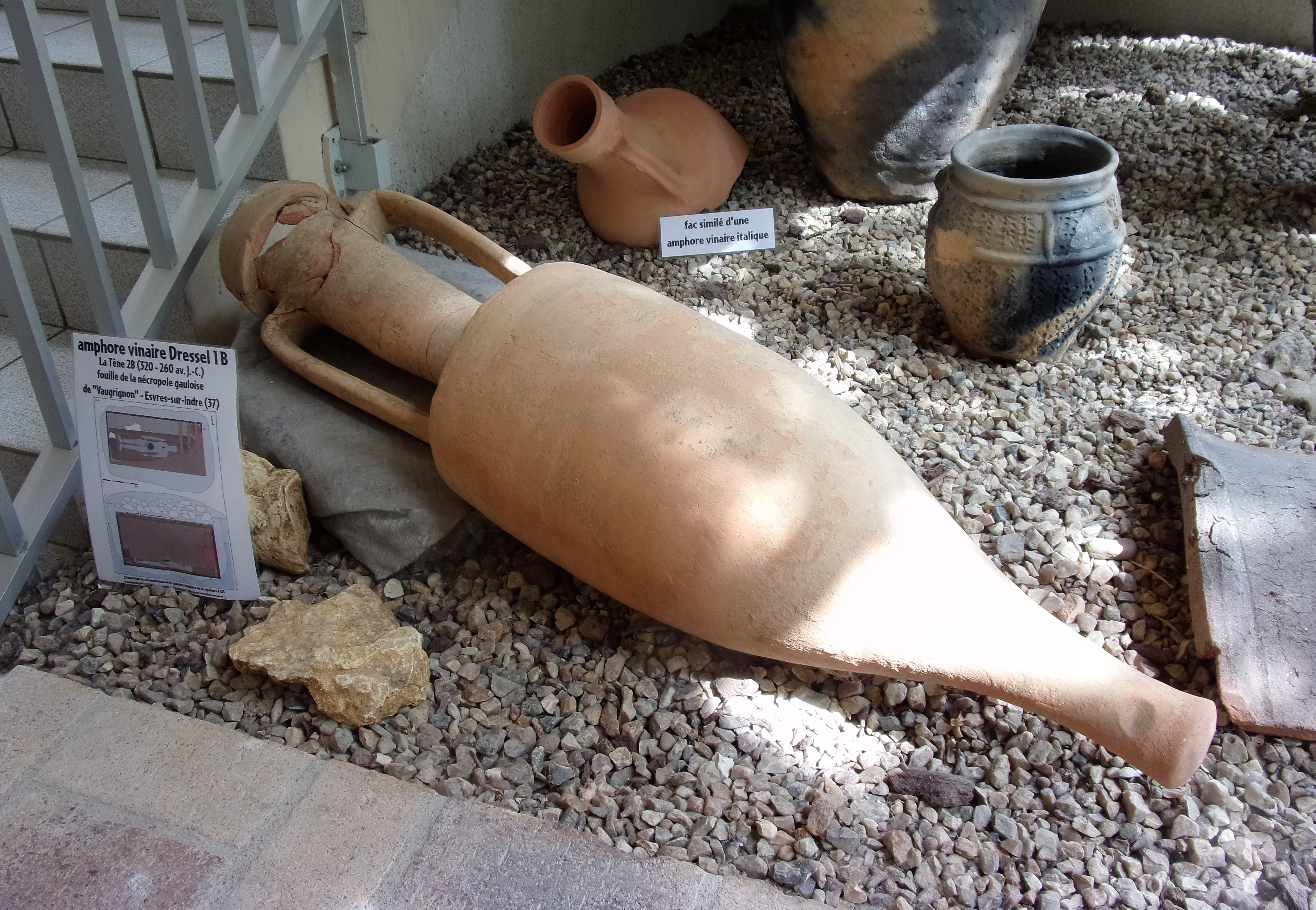 Amphore gauloise type Dressel, nécropole de Vaugrignon à Esvres